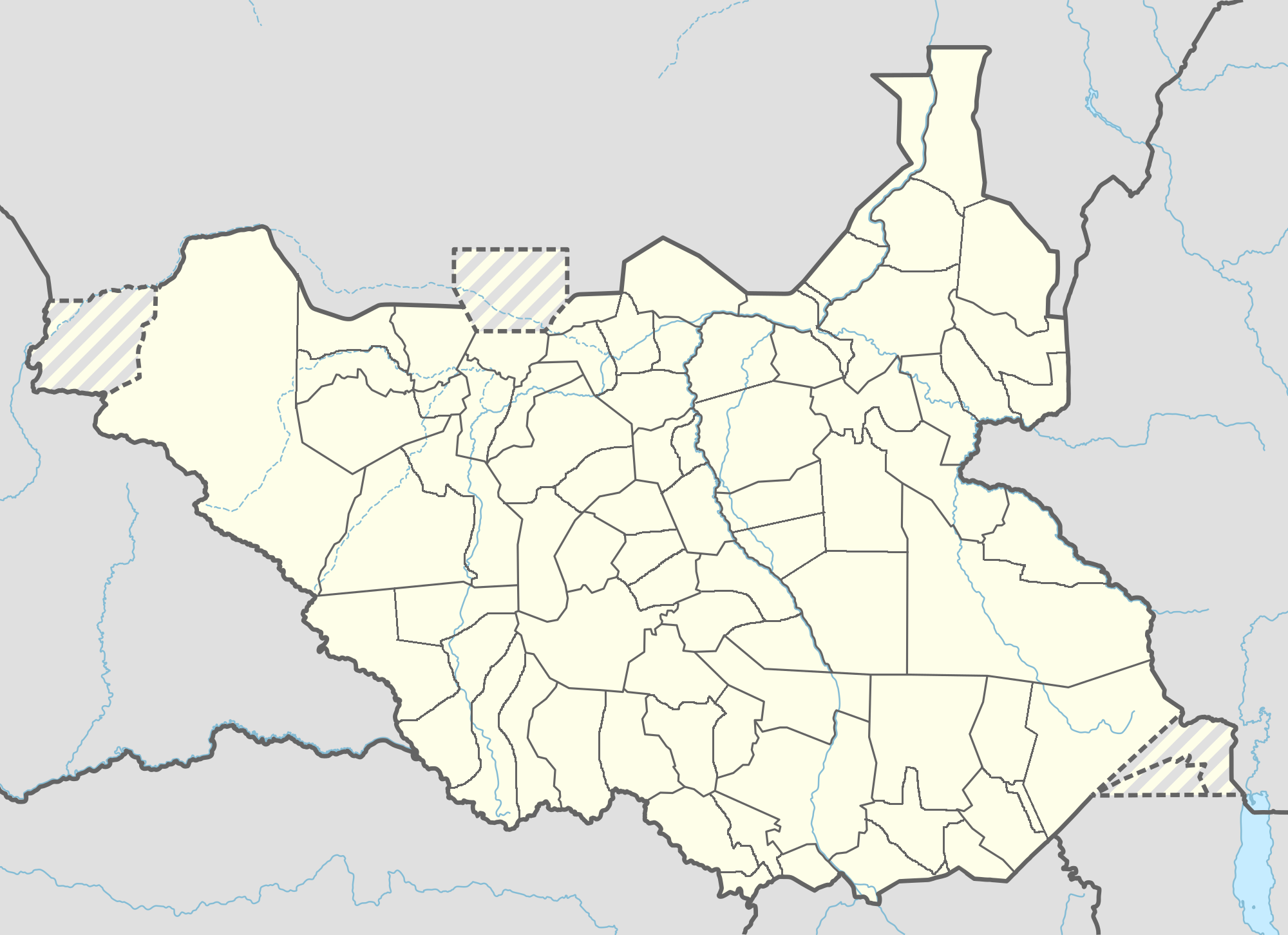 南スーダンの郡地図（78+アビエイ）参考 - [1]